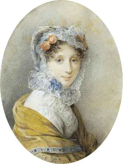 П.Ф.Соколов. Портрет графини С.В.Строгановой. Конец 1810-х годов.